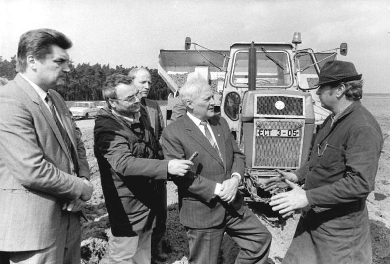 LPG Beeskow, Besuch durch Werner Felfe ADN-ZB Grimm 13.4.88 Bez. Frankfurt-Oder: Frühjahrsbestellung- Über den Fortgang der Frühjahrsarbeiten auf den Feldern informierte sich Werner Felfe (M.), Mitglied des Politbüros und Sekretär des ZK der SED, in der LPG Stremmen-Ranzig bei Beeskow. Auf einem 47 Hektar großen Schlag sprach er mit Genossenschaftsbauer Manfred Paul (r.). Links: LPG-Vorsitzender Bernd Groß. Abgebildete Person: Felfe, Werner: Mitglied des Politbüros und Sekretär des ZK der SED. (GND 123482275)